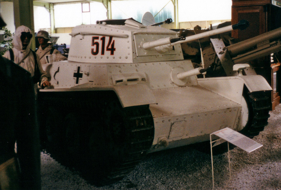 Beschreibung: swiss LTH_H or Pzw. 39 or TNHB / swiss Version of Panzer 38(t) / 24 were build